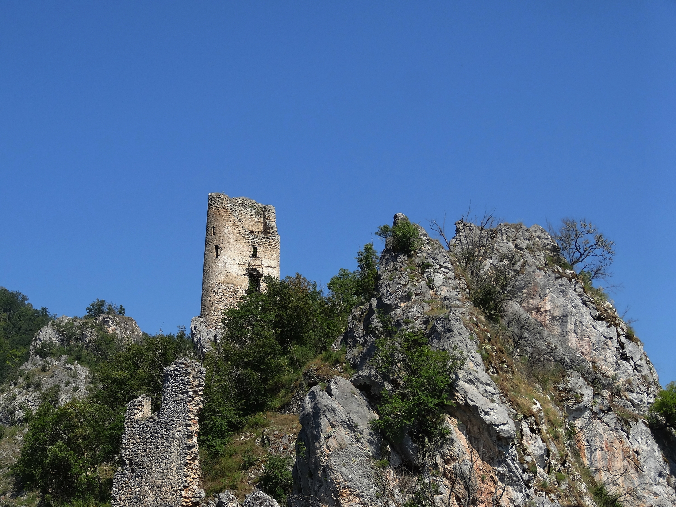 Stari grad Samobor, Novo Goražde This image was uploaded as part of Trace of Soul 2016.